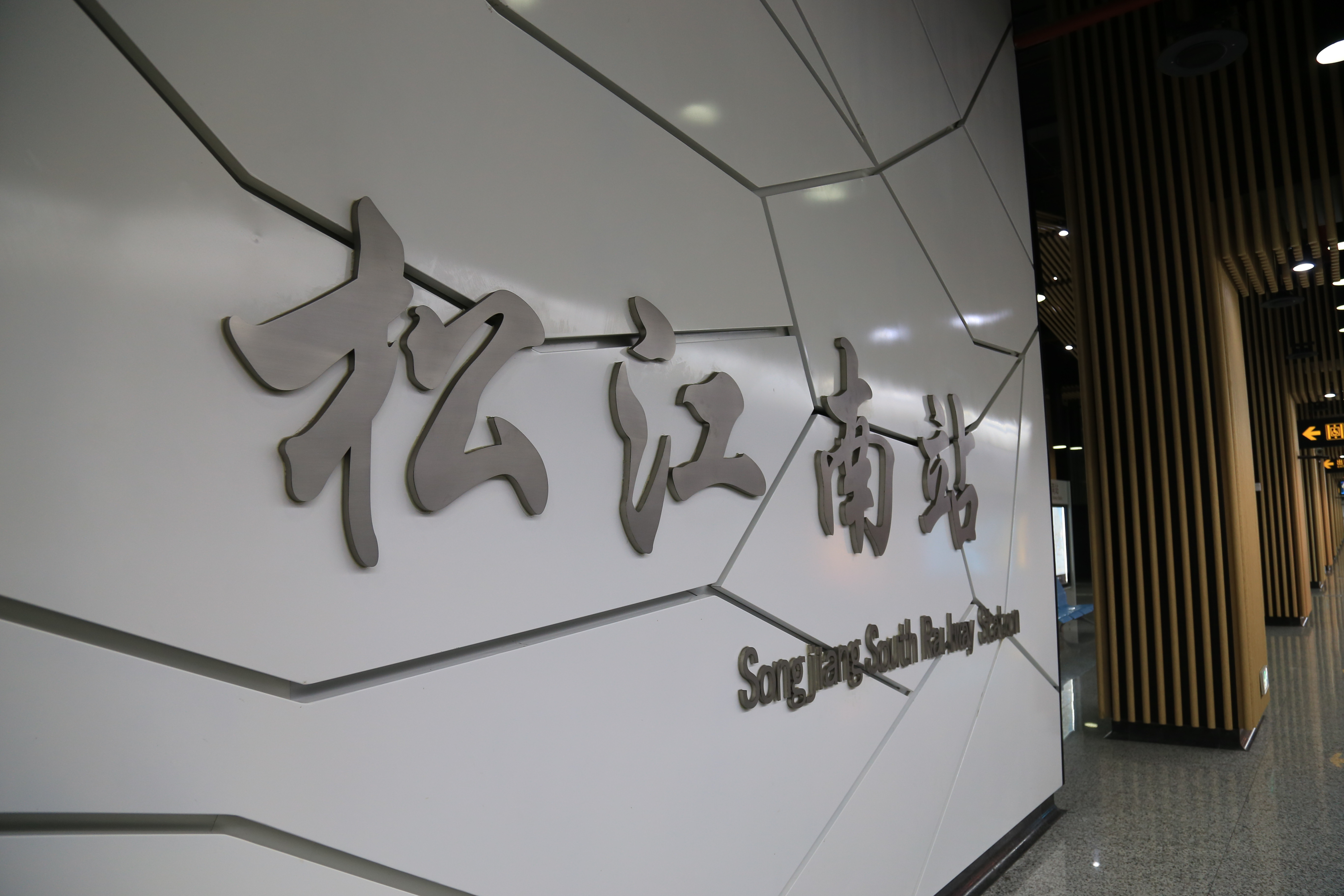 松江南站大字壁